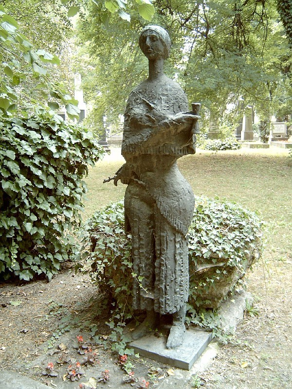 Mihályfi Ernő sírja Budapesten. Kerepesi temető: 34/2-1-22.